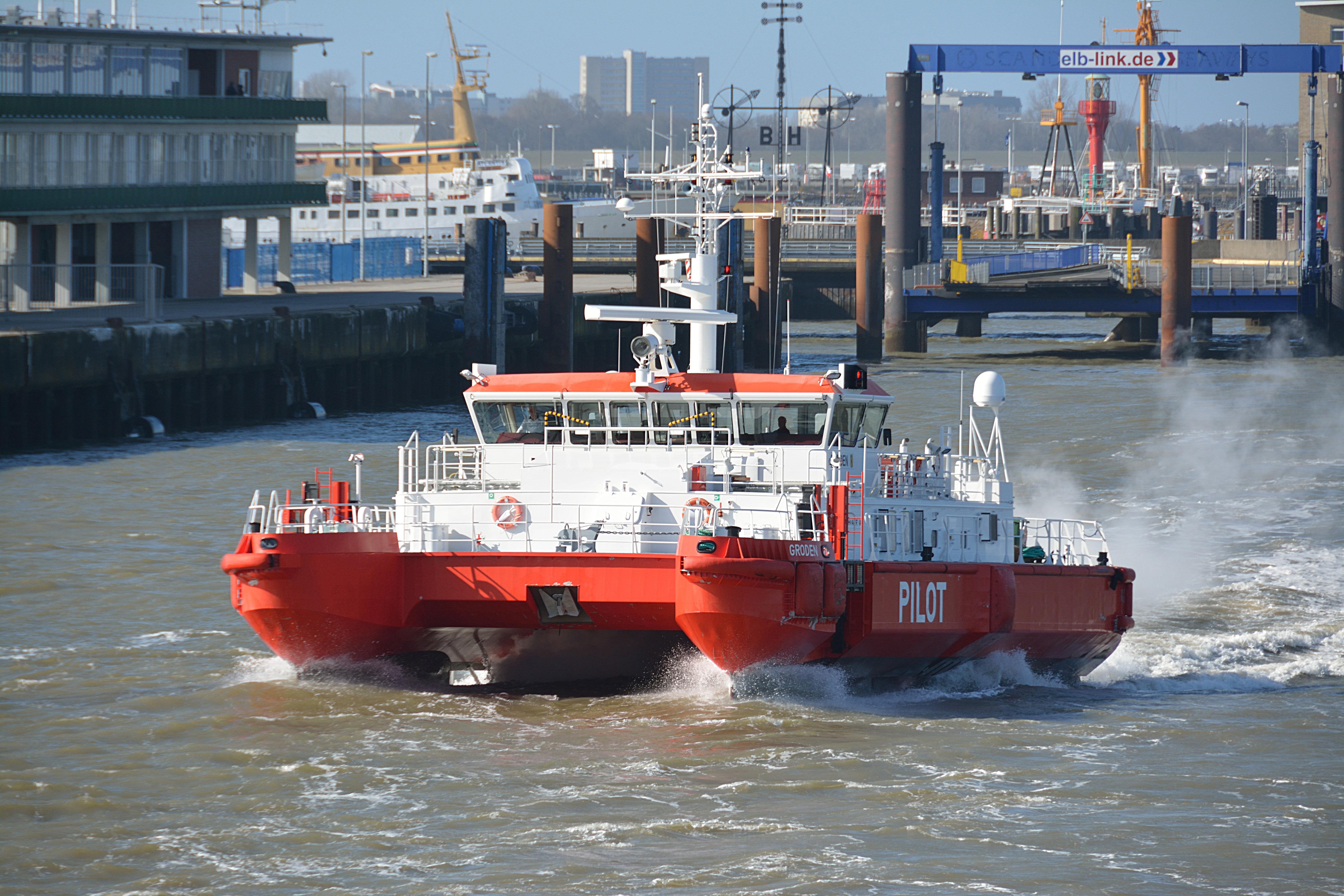 Der Pilottender "Groden", benannt nach einem Stadtteil von Cuxhaven, ist ein Doppelrumpfboot.